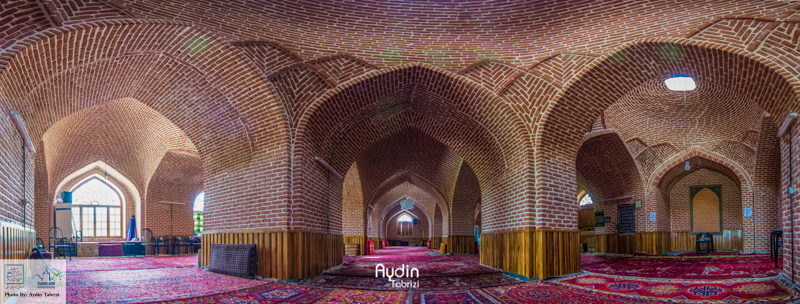 مسجد جامع اهر